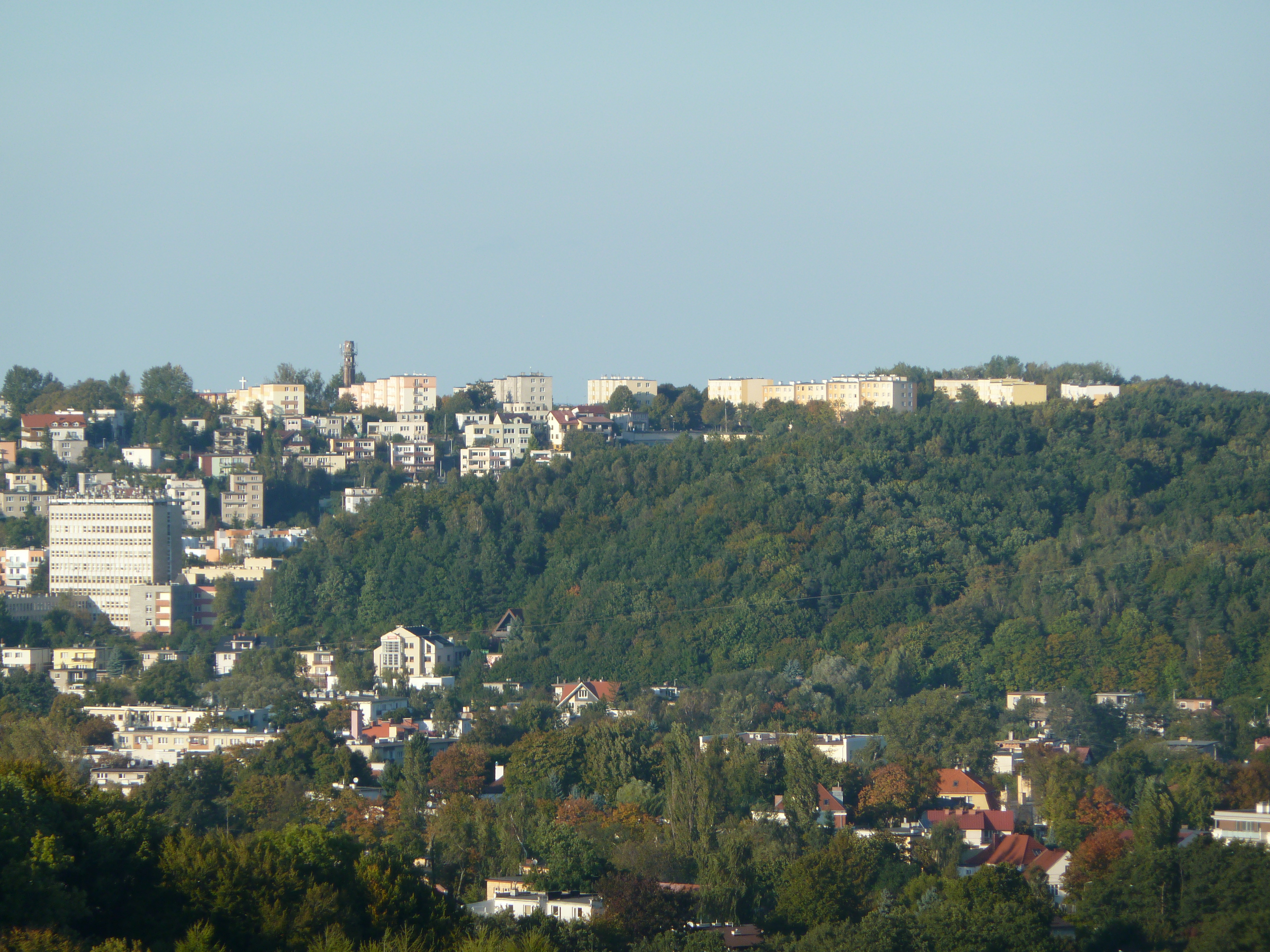 Gdynia Redłowo widoczna z Wieży widokowej w Kolibkach